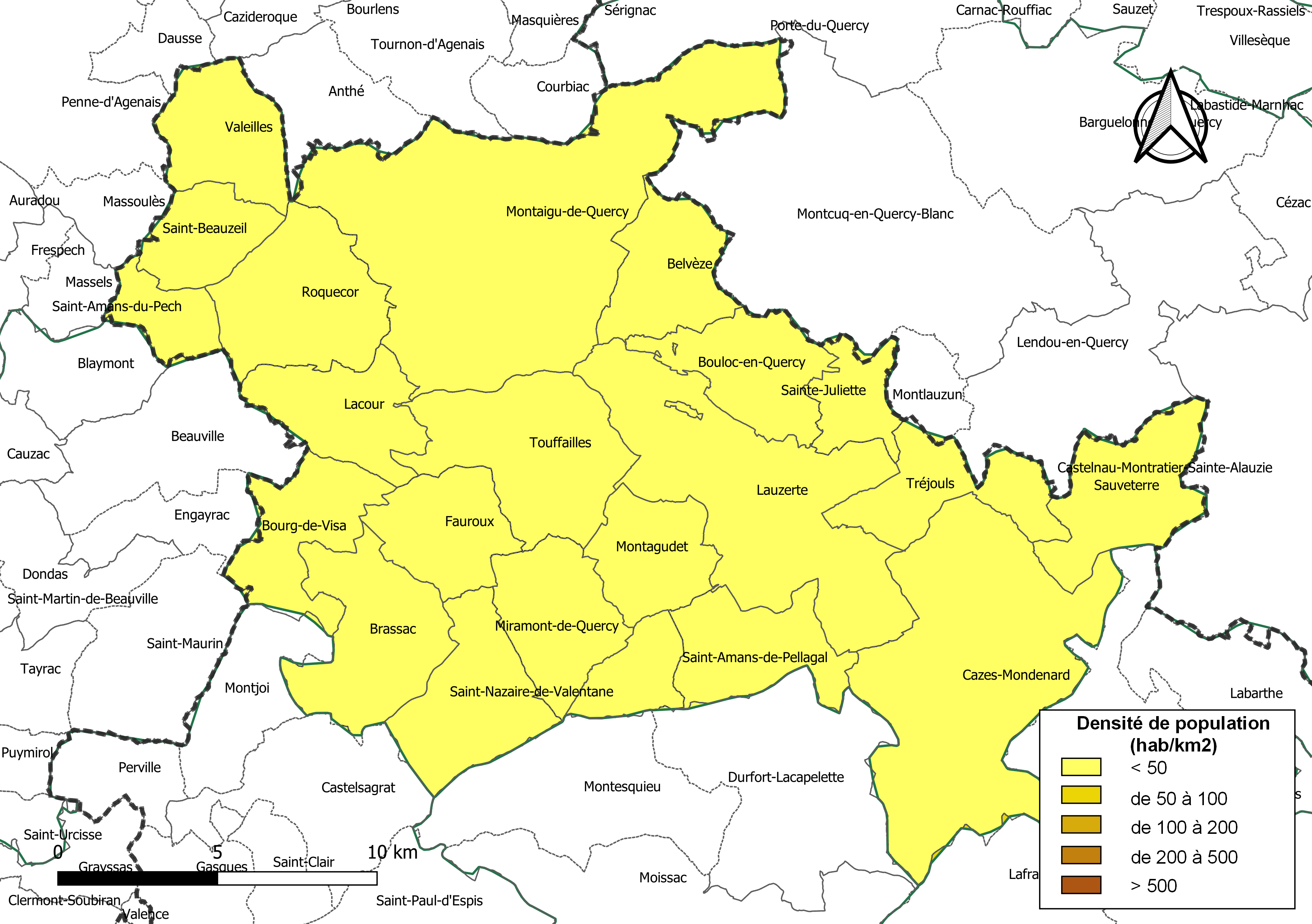 Carte des densités de population (millésimée 2016) des communes de la Communauté de communes du Pays de Serres en Quercy, département de Tarn-et-Garonne, France. Composition au 1er janvier 2019.